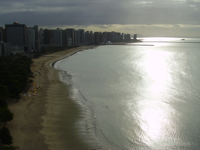 Orla de Fortaleza, vista do Othon Palace Hotel de Fortaleza